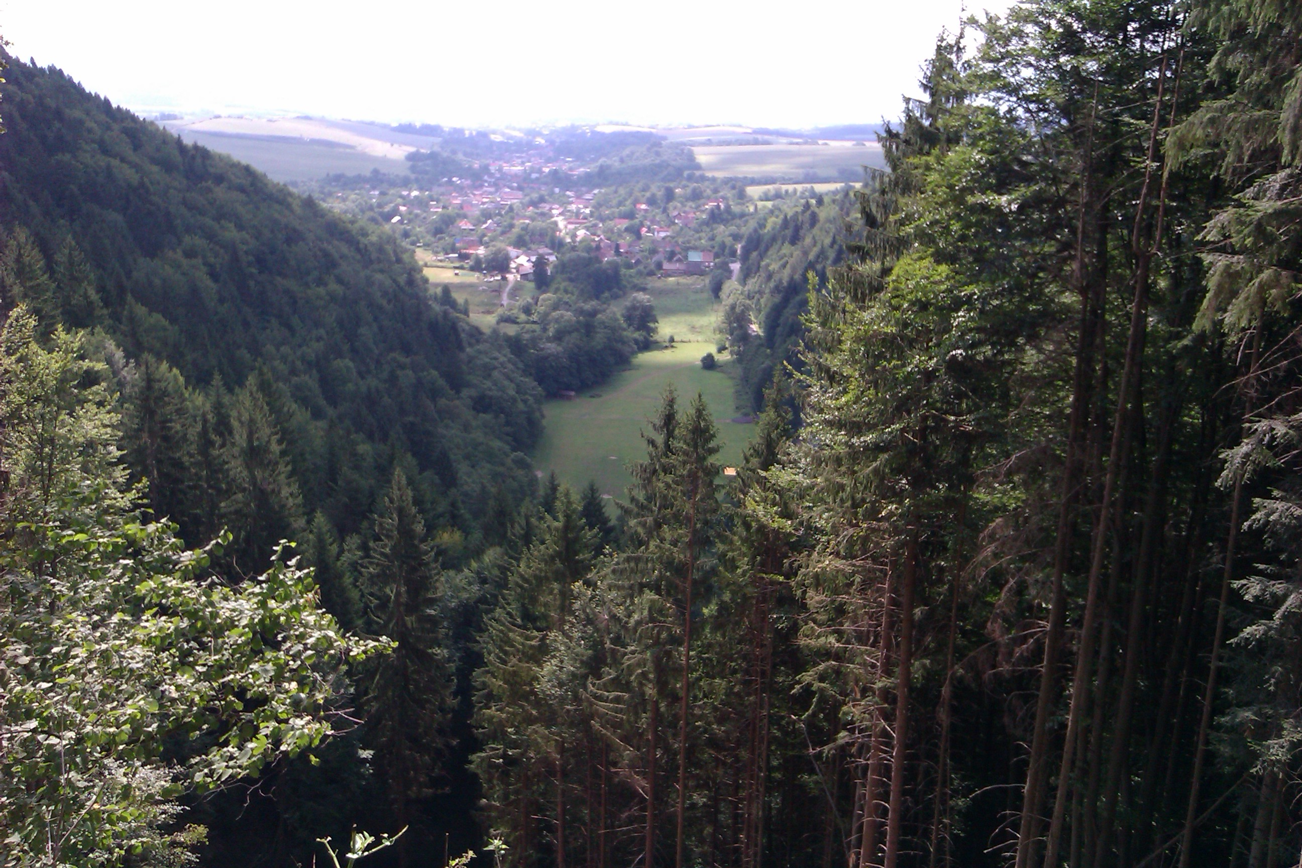 Tužina, Slovakia